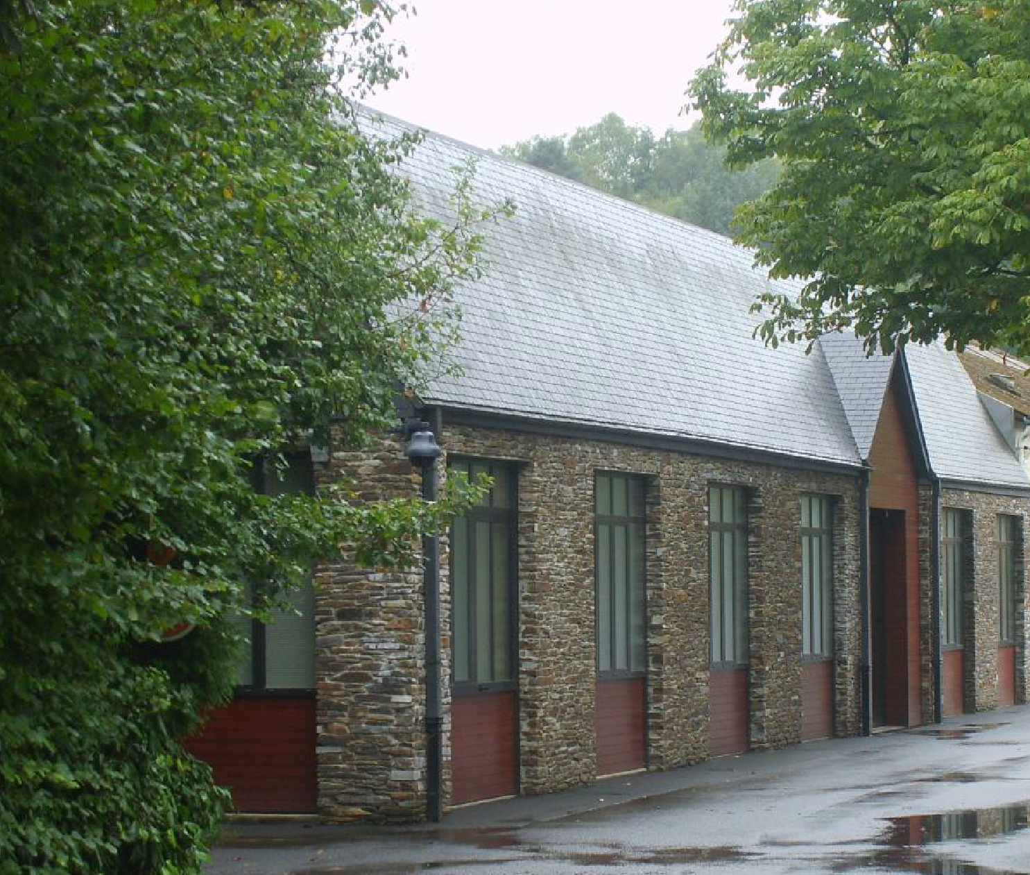 Ateliers originels dessinés par Emile Faynot, vers 1912